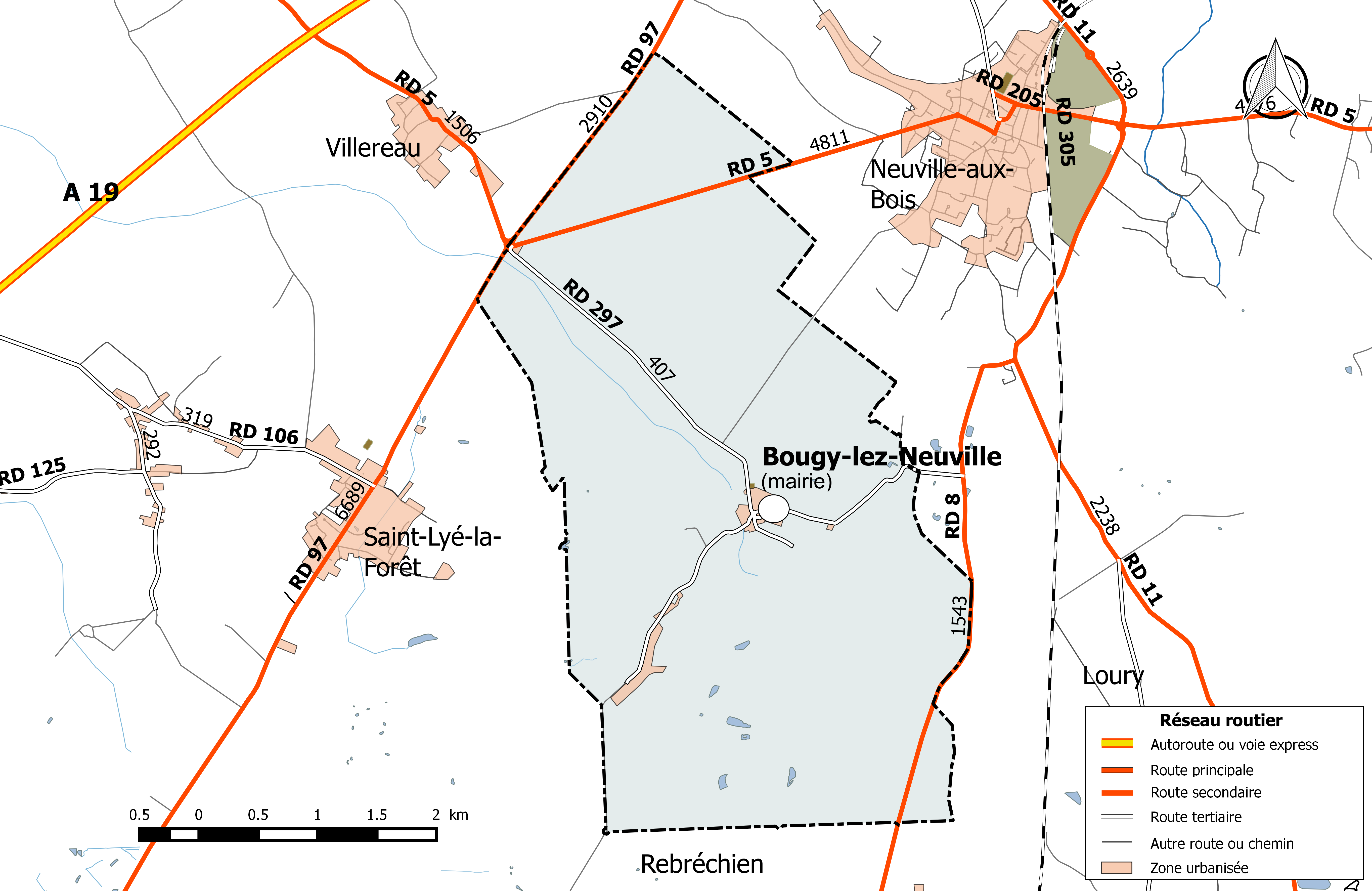 Carte du réseau routier de la commune de Bougy-lez-Neuville.